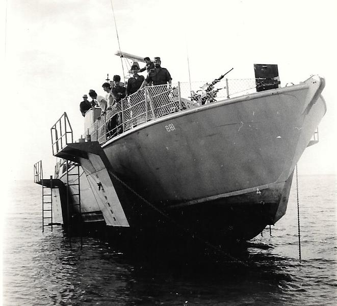 ספינת דבור מס 881 מועלית לתיקון בחוף רס סודר לאחר שנפגעה מאש נשק קל מצרים מהאי גרין.